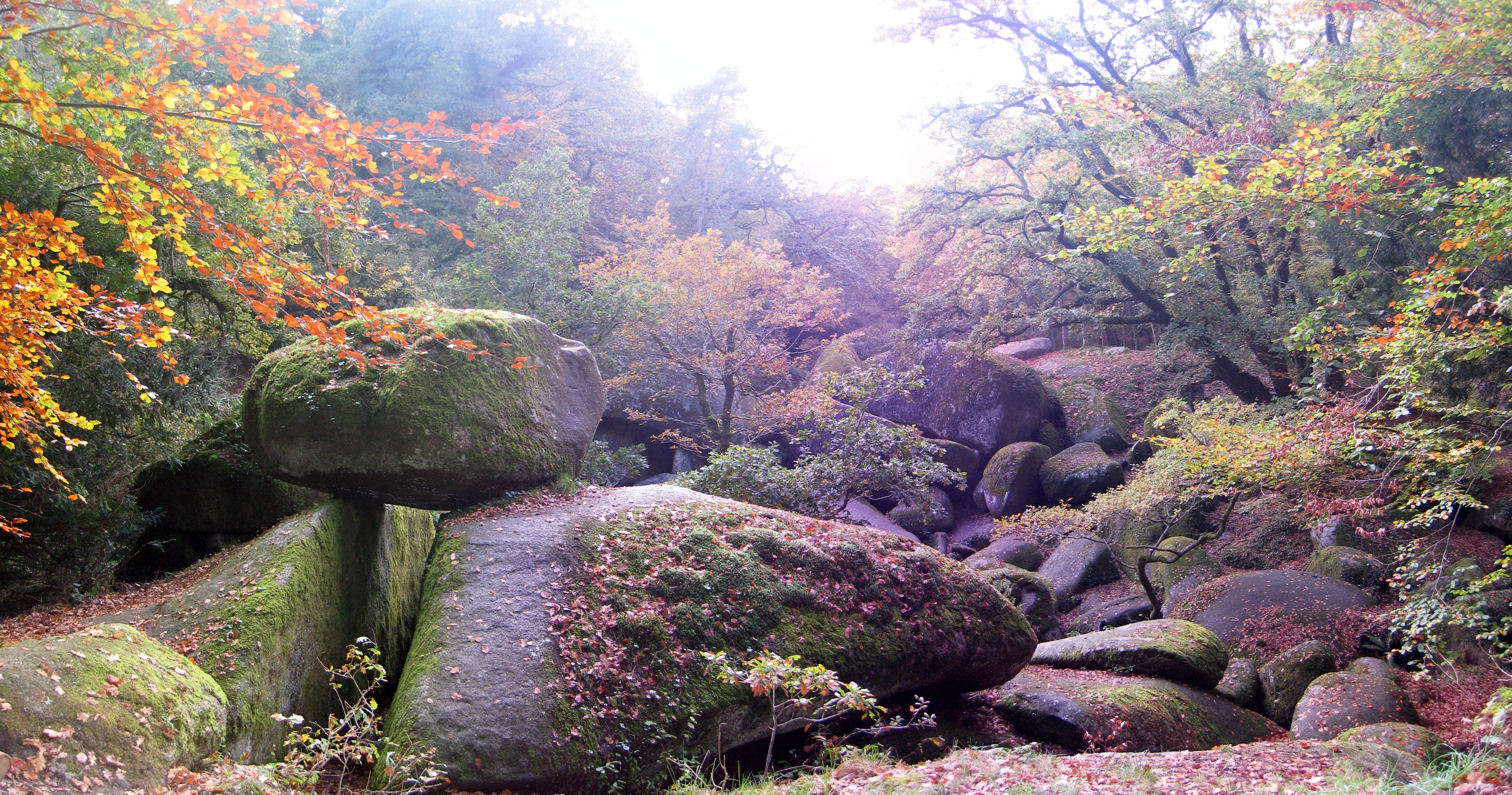 Chaos de rochers en forêt de Huelgoat.